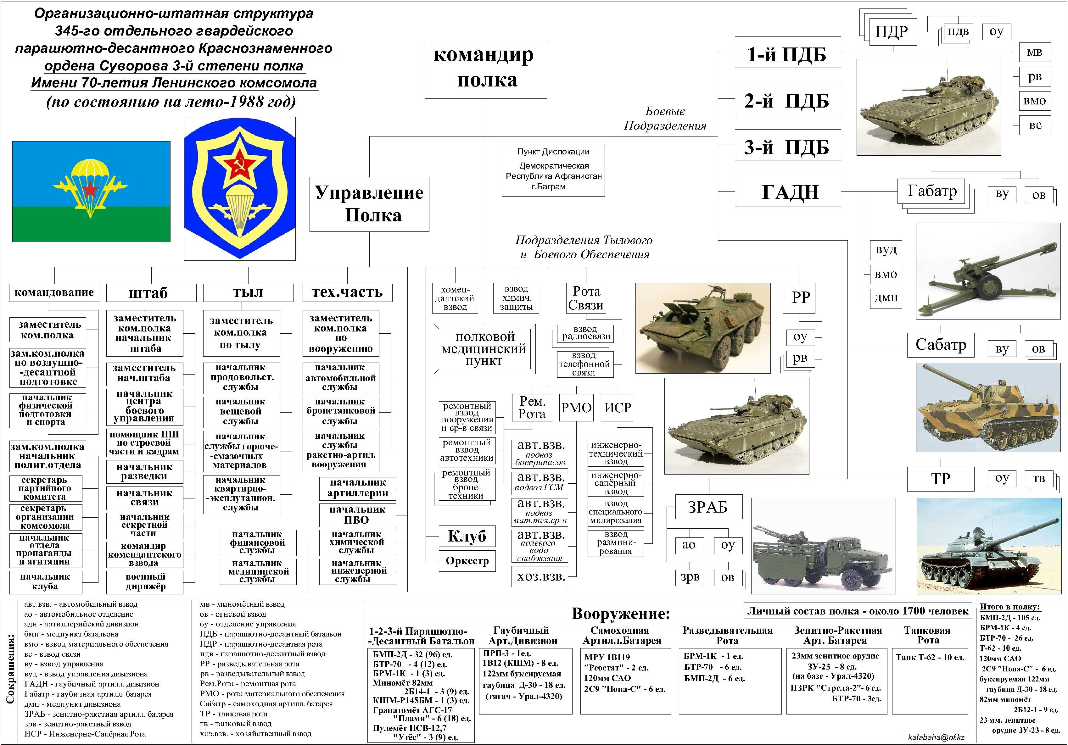 Организационно-штатная структура 345-го гвардейского отдельного парашютно-десантного полка на лето-1988. Собственная работа на основе данных взятых с сайтов 345-го гв.опдп а также с сайта ветеранов ВДВ - и данных взятых у Бешкарева Александра Ивановича "ПЕРЕЧЕНЬ СОВЕТСКИХ ВОИНСКИХ ЧАСТЕЙ В АФГАНИСТАНЕ (1979-1989 гг.)" с сайта Отчерчено в AutoCAD 2005 собственноручно.